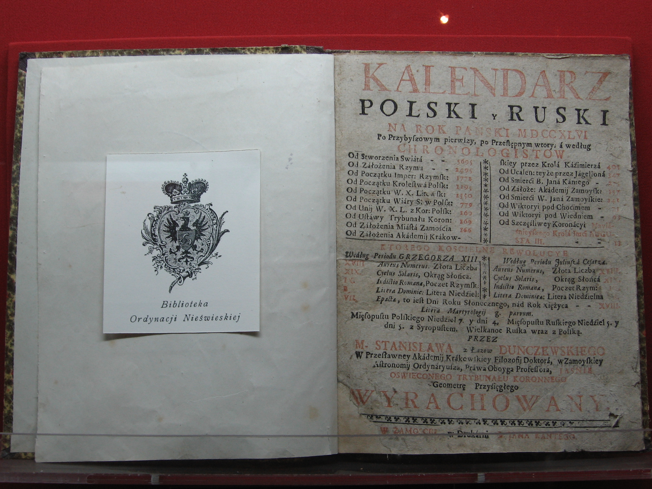 Календарь пльский и русский. Находится в Нац. истор. музее РБ